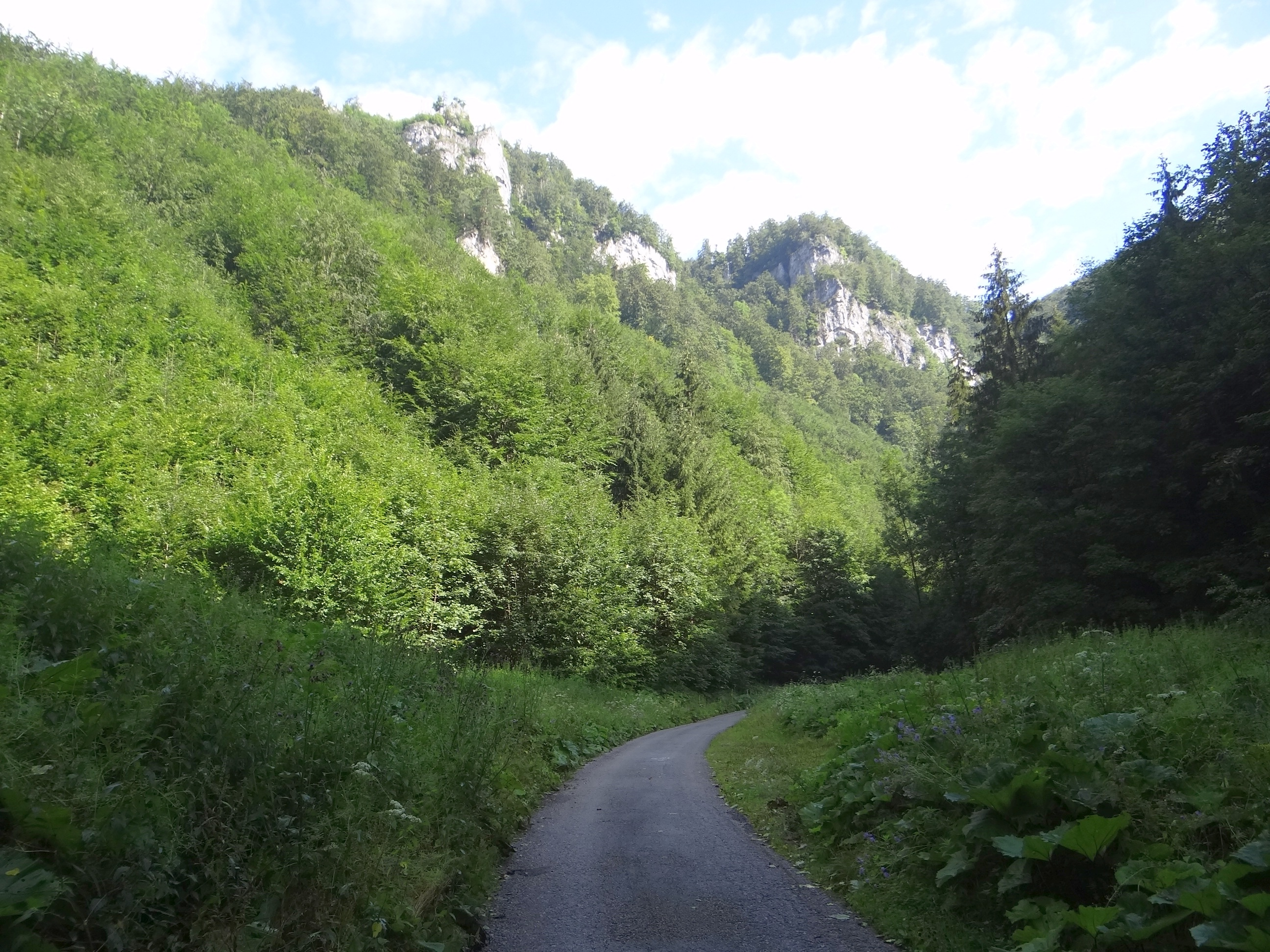 Bystrická dolina (Veľká Fatra)